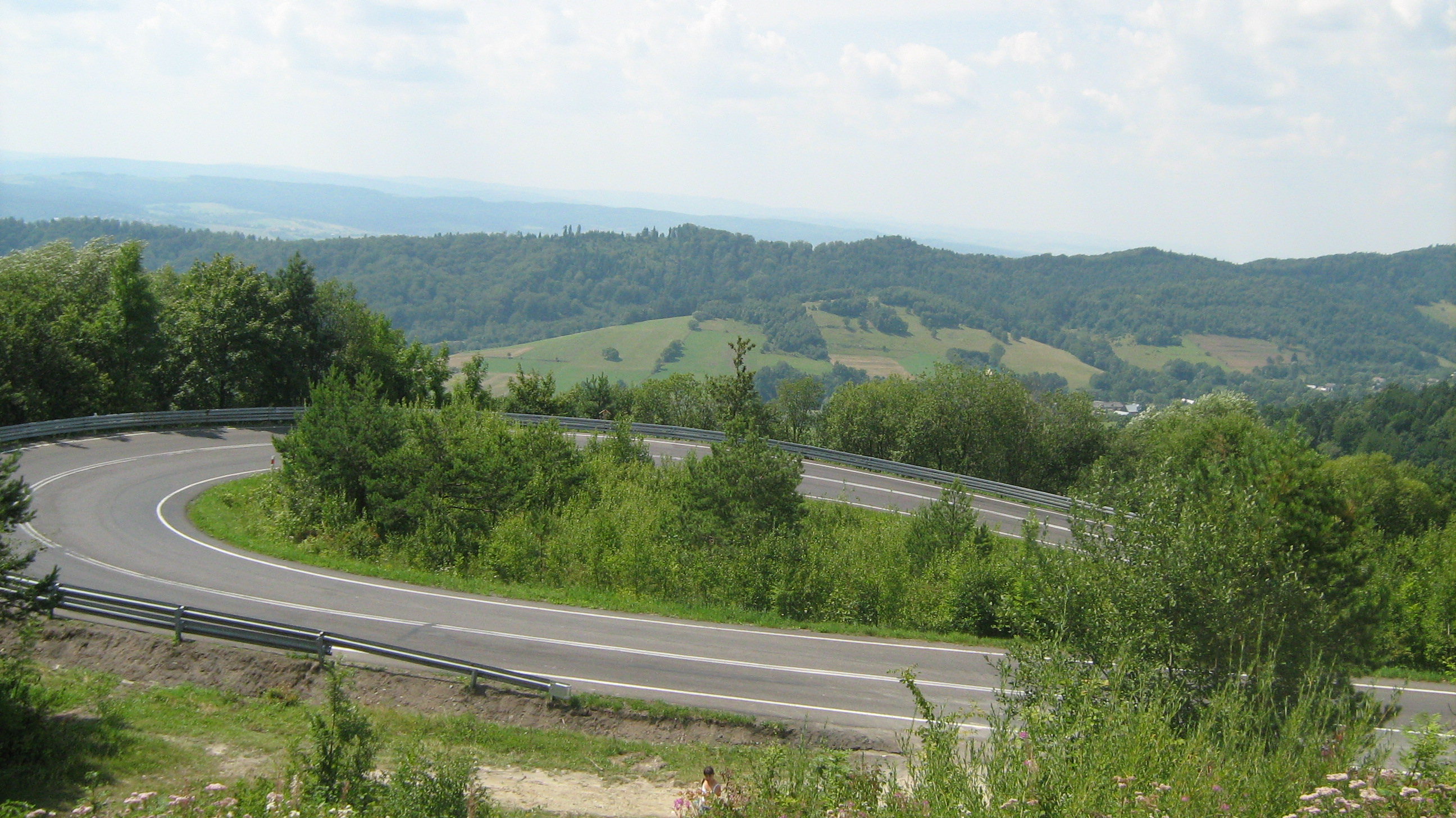 Góry Słonne - serpentyny na drodze krajowej nr 28